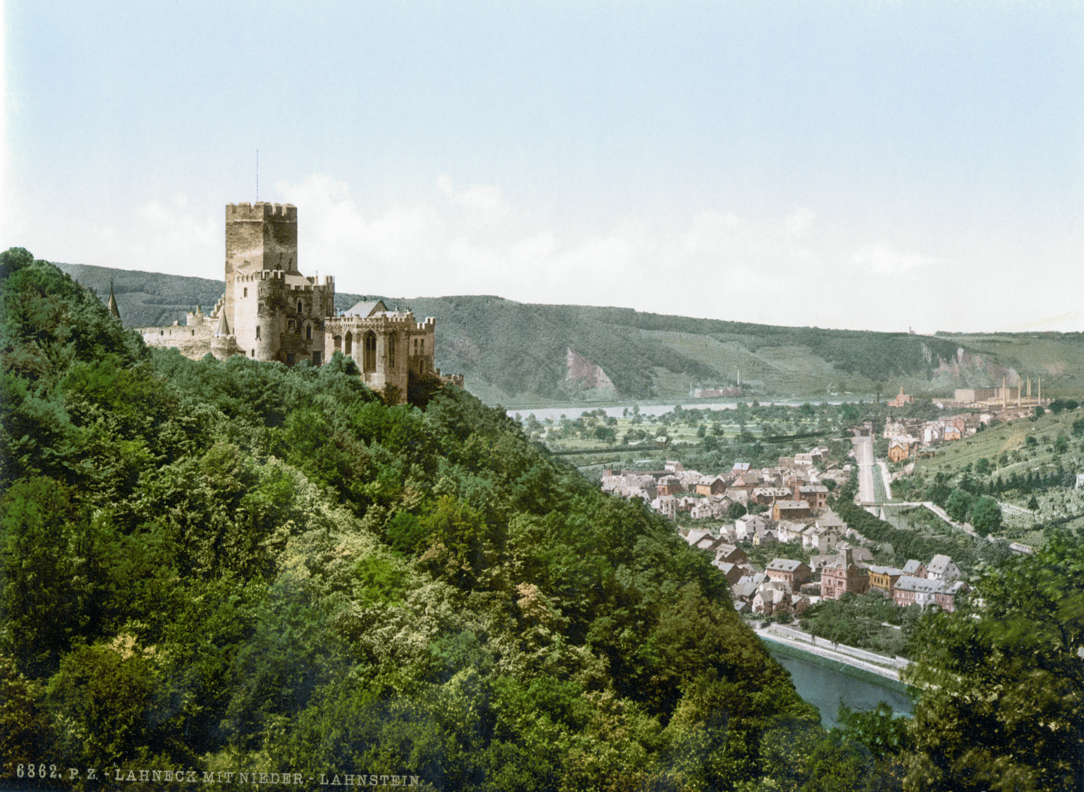 Lahneck Niederlahnstein